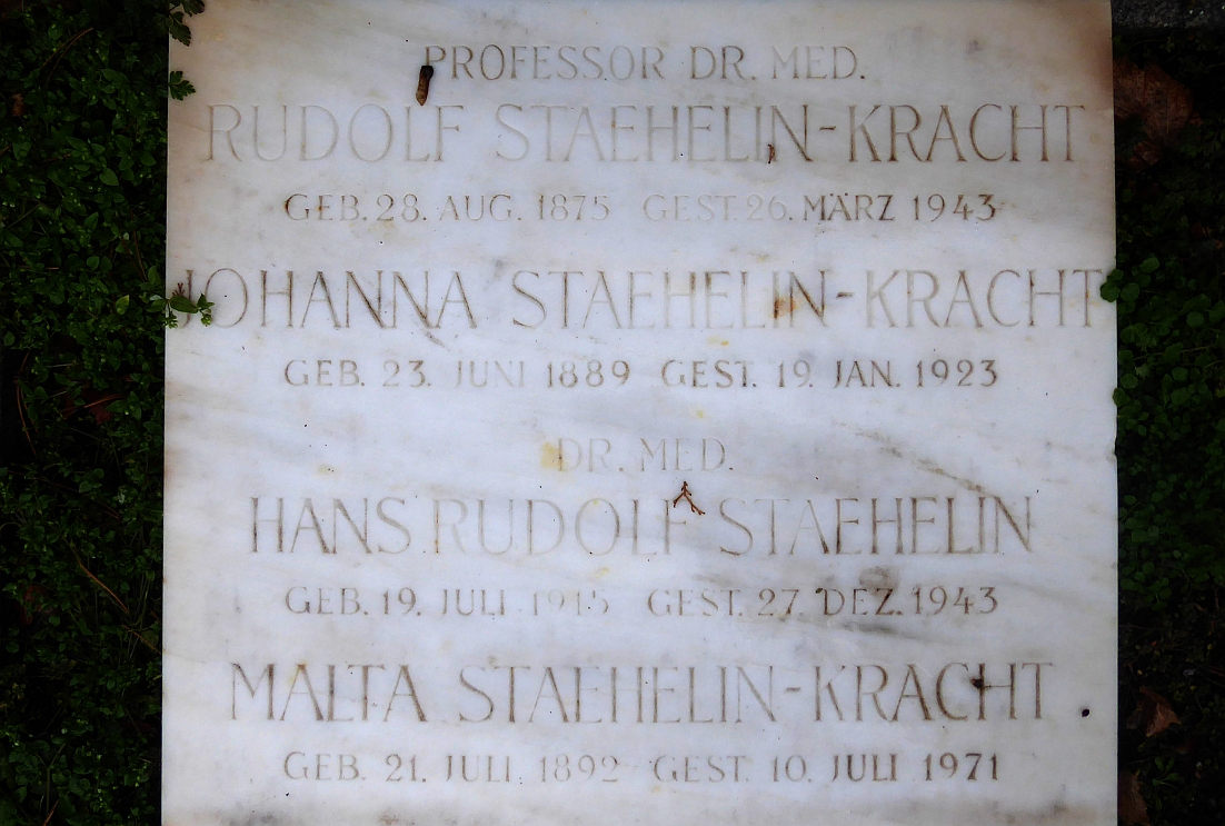 Rudolf Stähelin-Kracht (1875–1943) Dr.med., Professor der inneren Medizin, Direktor der Universitätsklinik Basel. Er forschte u.a. zu Tuberkulose, Respirations-, Kreislauf-, Stoffwechsel und Infektionskrankheiten. Grab auf dem Friedhof Wolfgottesacker, Basel. Familengrab: Stähelin-Clemens-Stockmayer-Kracht-Kober-Pfeifer-Schwabe-Jucker